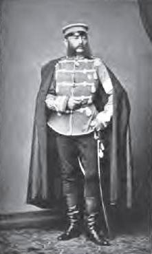 Eberhard zu Stolberg-Wernigerode (1810-1872), Präsident des preußischen Herrenhauses